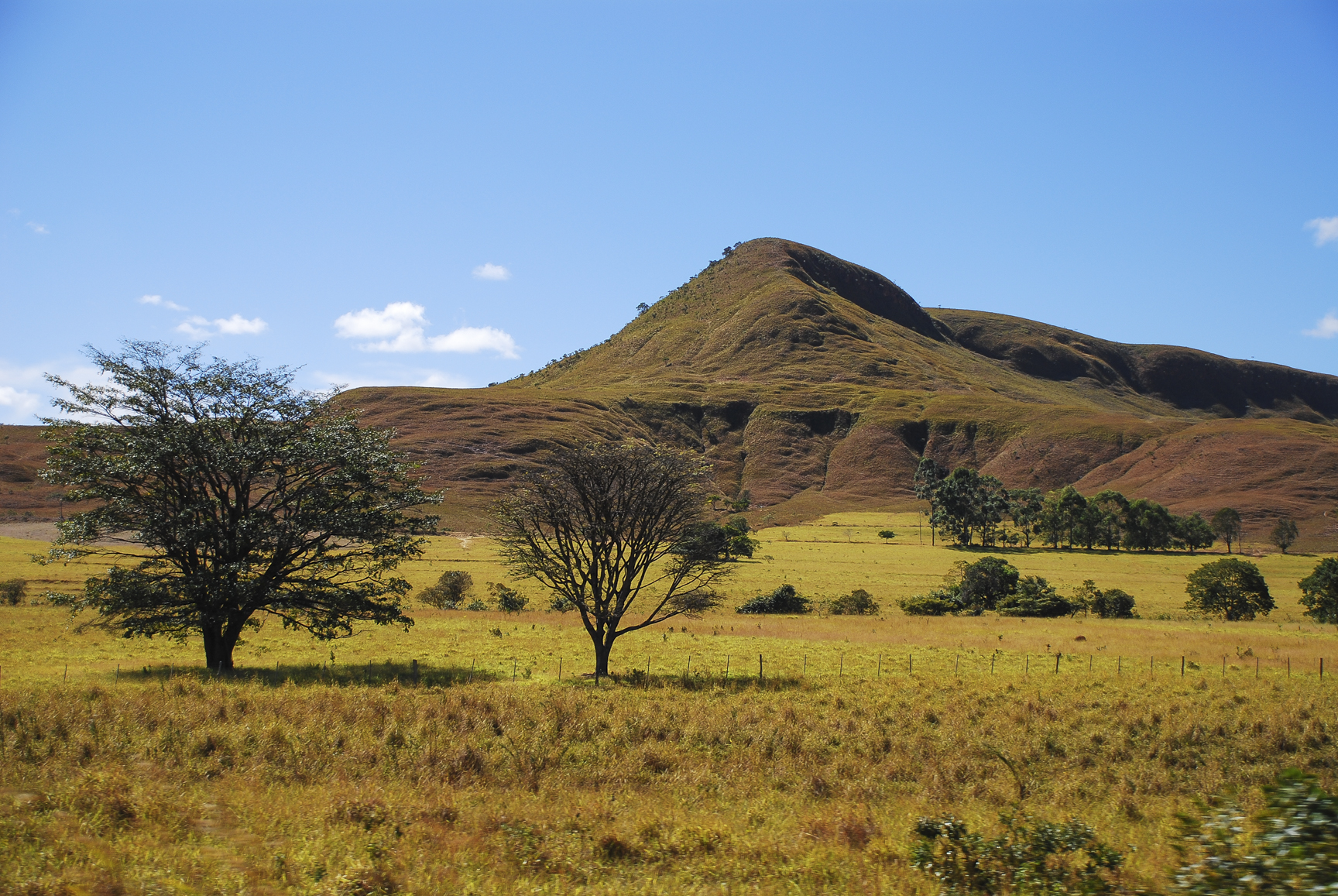 Cartão postal da rodovia GO 118 (São João da Aliança - Alto Paraiso de Goiás)